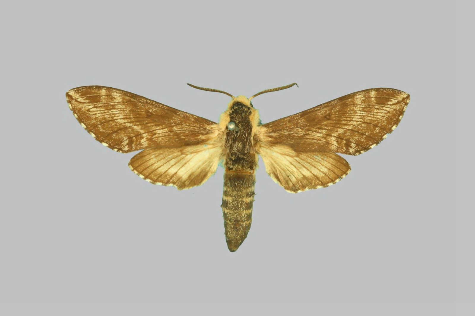 Neogene corumbensis, male, upperside.